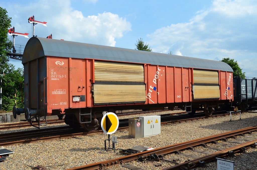 Nederlands Spoorwegmuseum wagen NS 242 2 043 HbbkkSS. Foto: Erik Swierstra.